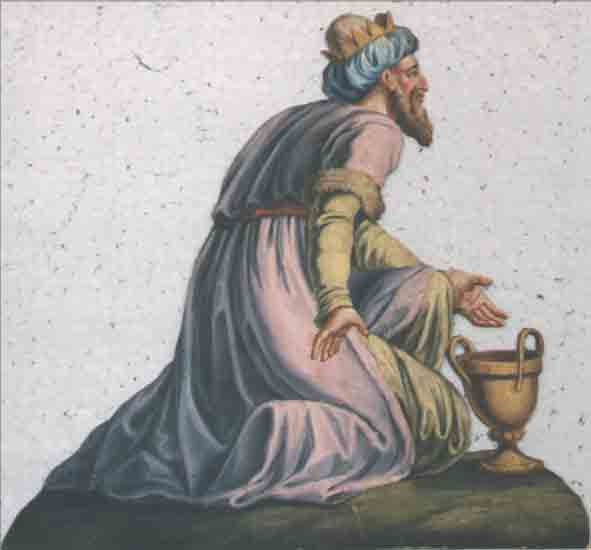 Papierkrippenfigur von Jakob Ginzel (1792-1862)